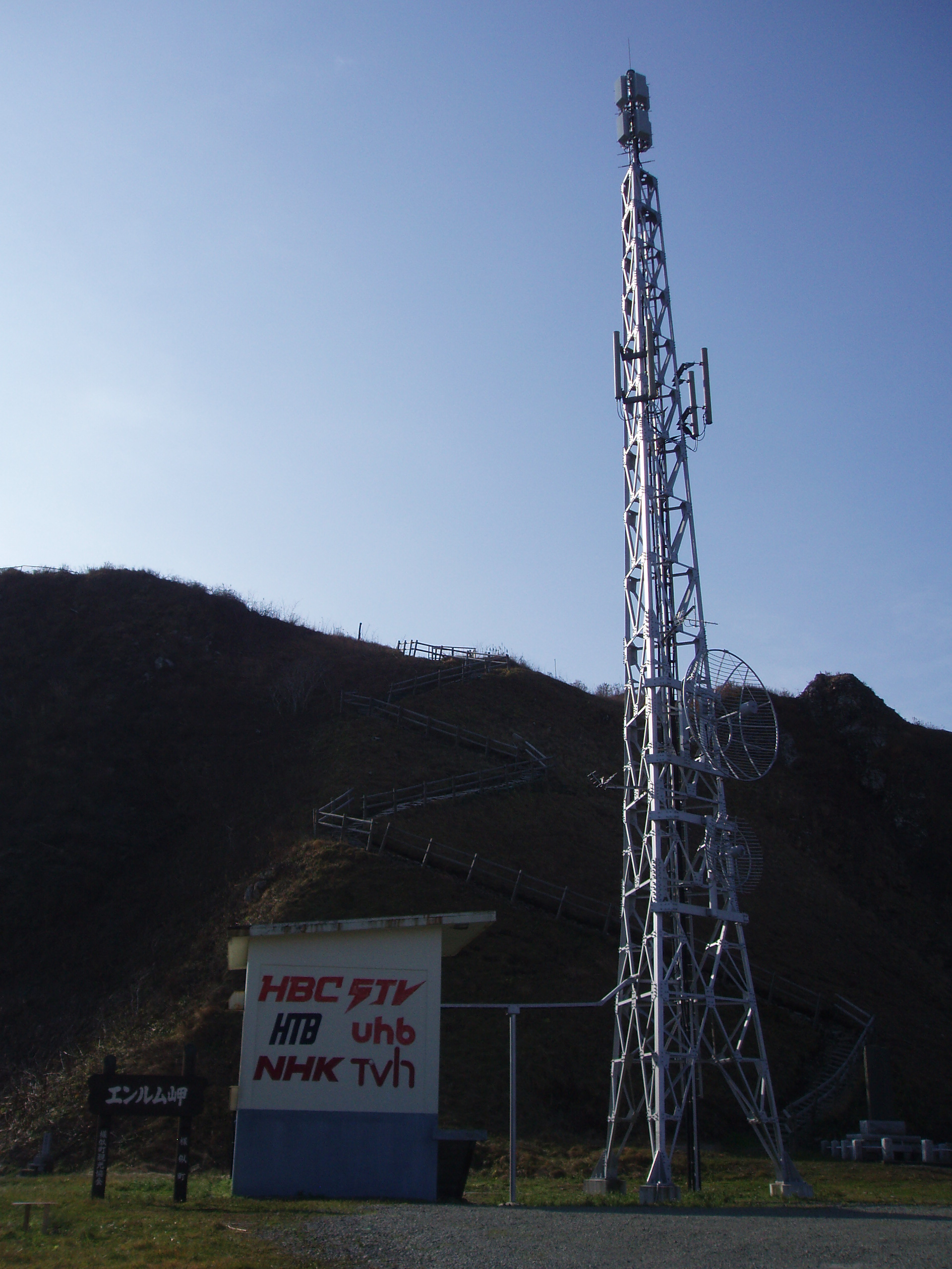 様似中継局